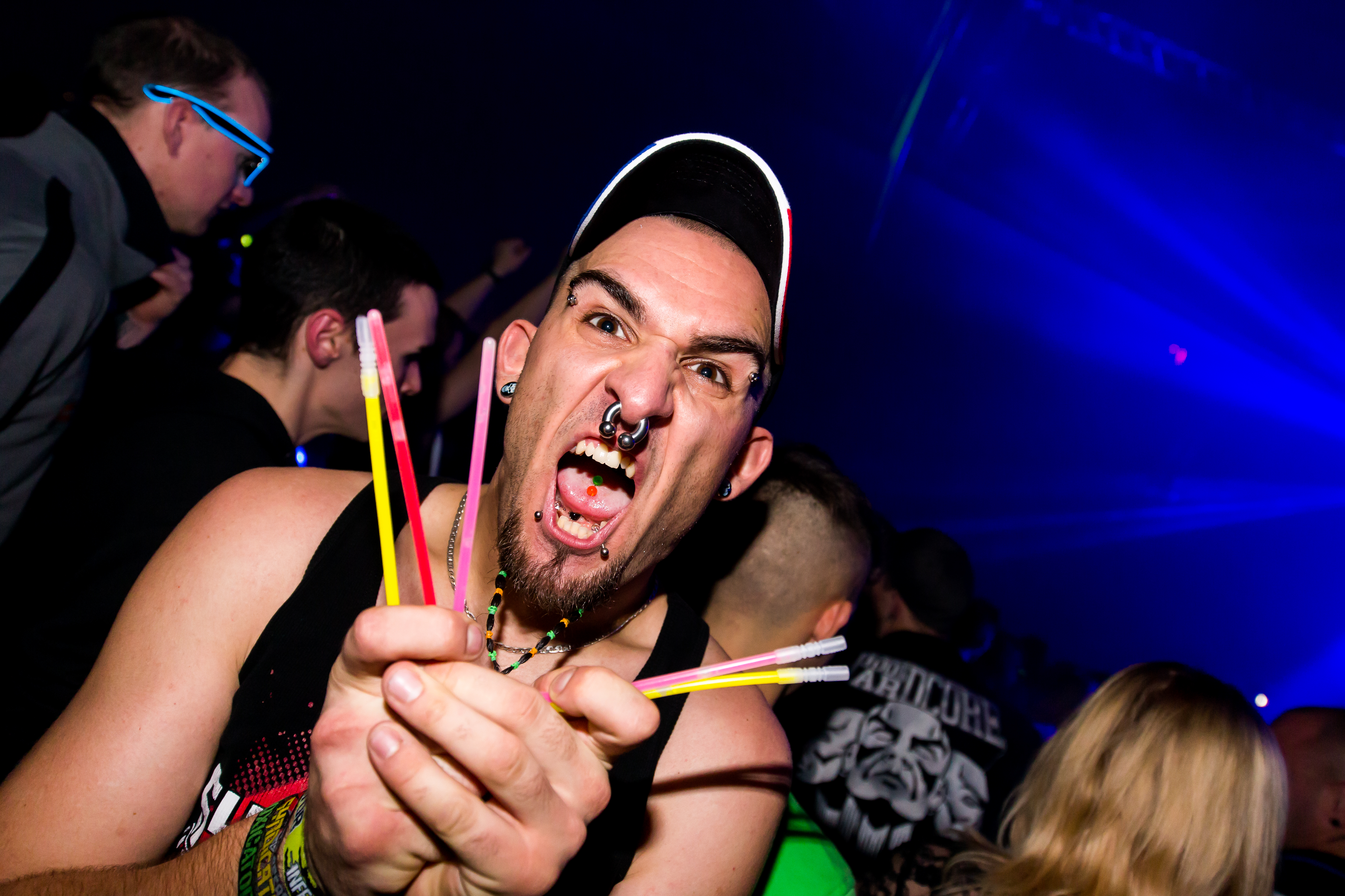 during Toxicator at Maimarkt Halle, Mannheim, Baden Württemberg, Germany on 2015-12-05, Photo: Sven Mandel